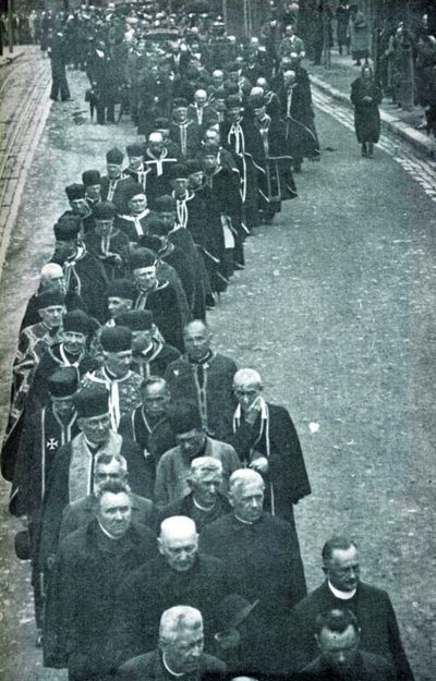 Процессия Талергофского съезда во время открытия Монумента жертвам Талергофа во Львове на Лычаковском кладбище, 1934 год